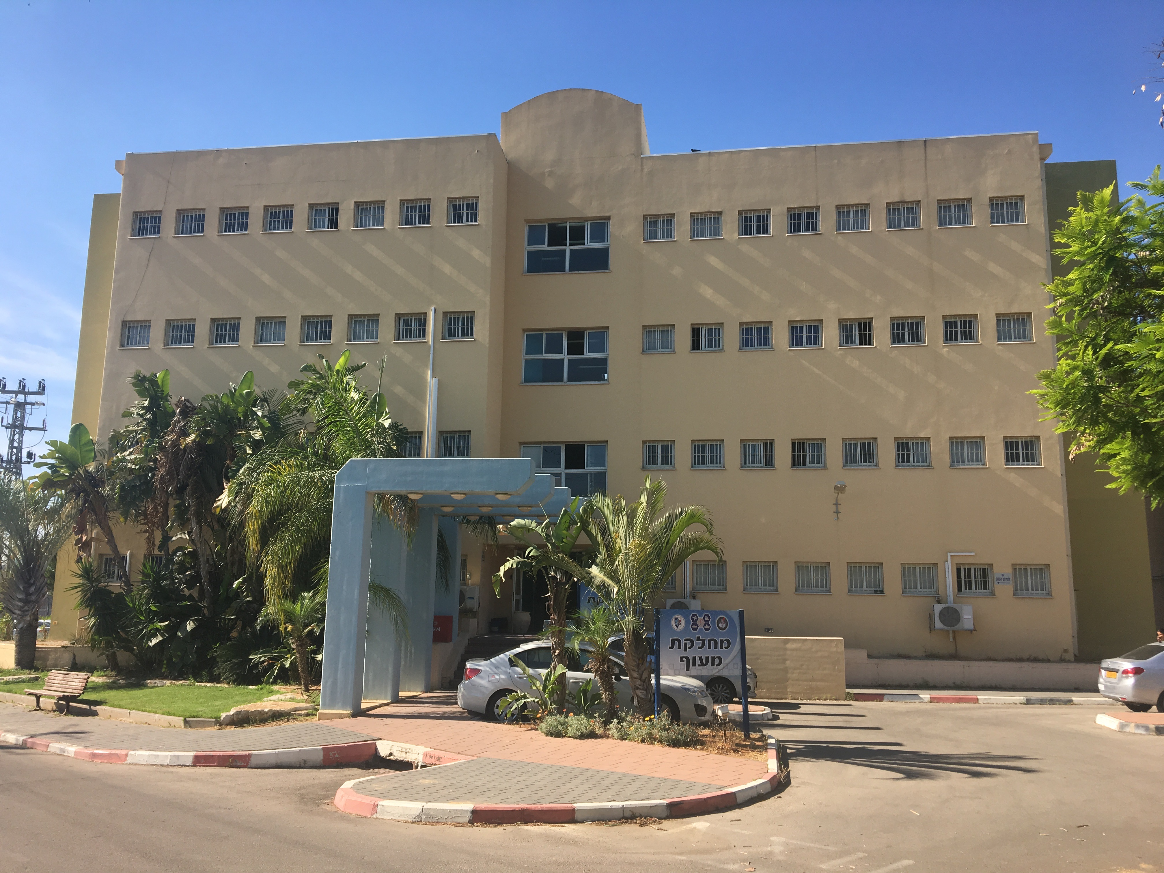 בנין מחלקת מעוף בצריפין